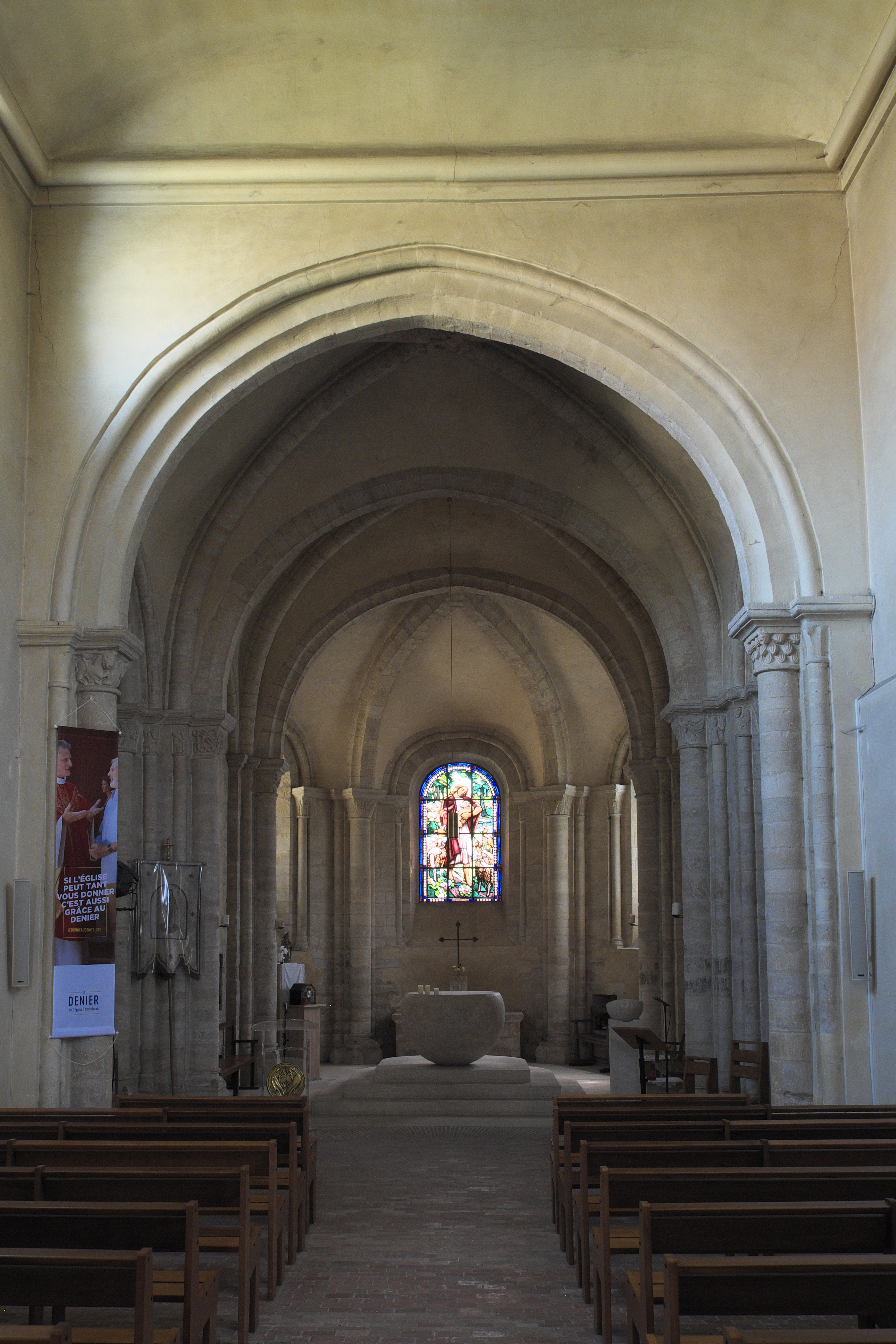 Katholische Pfarrkirche Saint-Julien-de-Brioude in Marolles-en-Brie im Département Val-de-Marne (Île-de-France/Frankreich), Innenraum